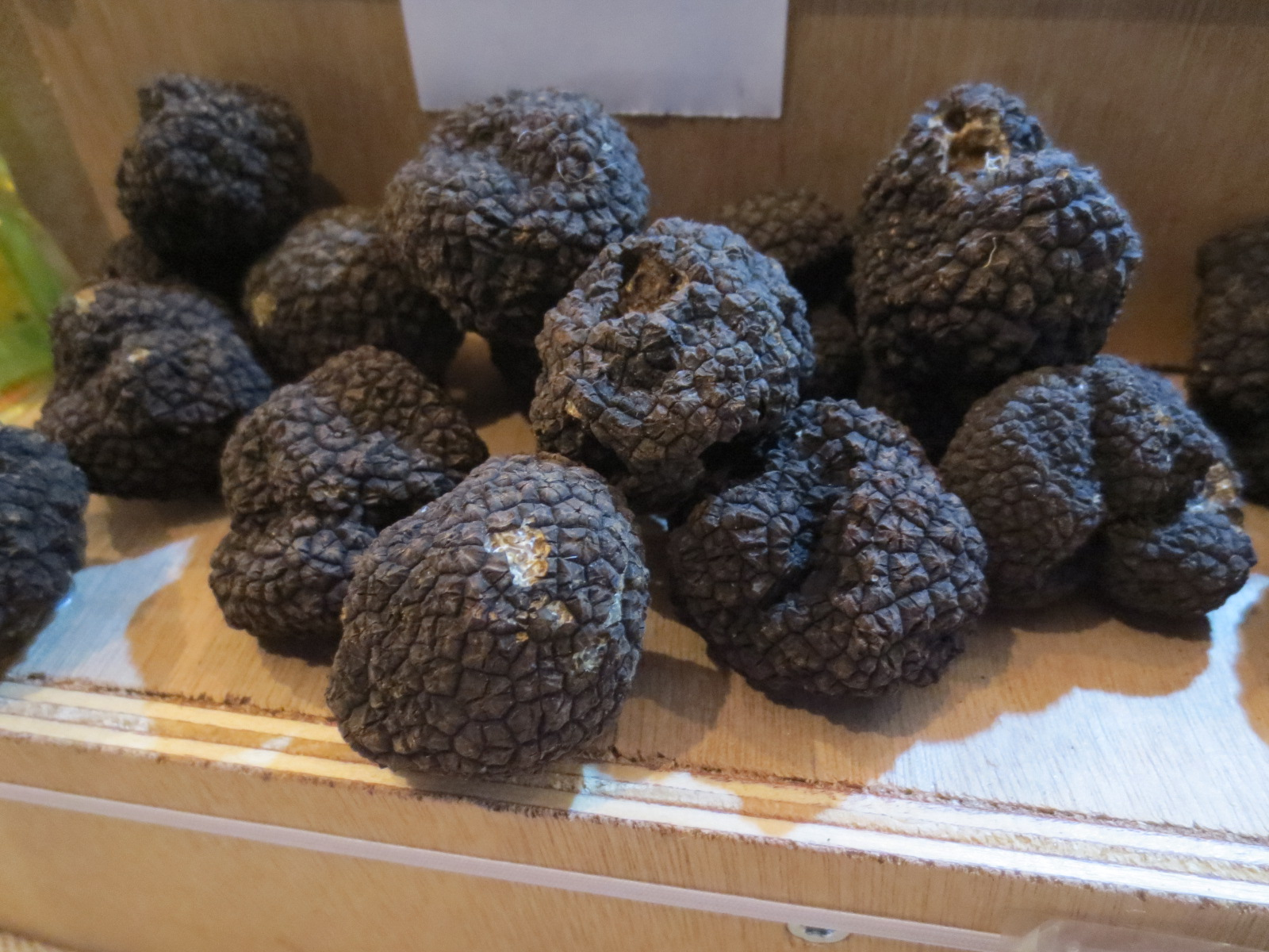 Vente des hospices de Beaune